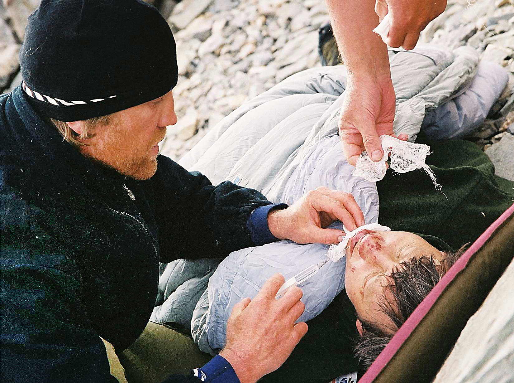 Priit Melnik